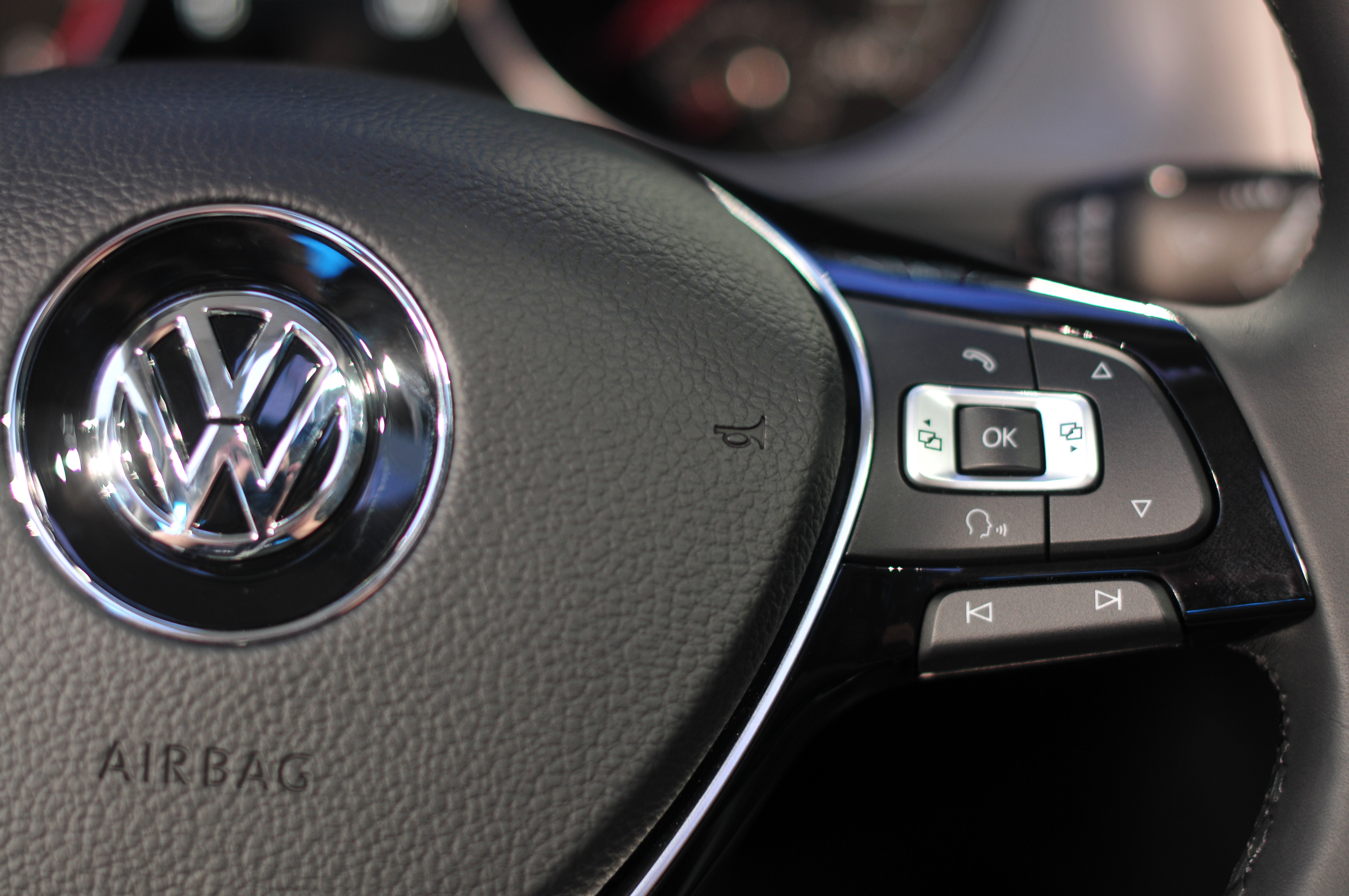 Autostadt Wolfsburg, Golf VII